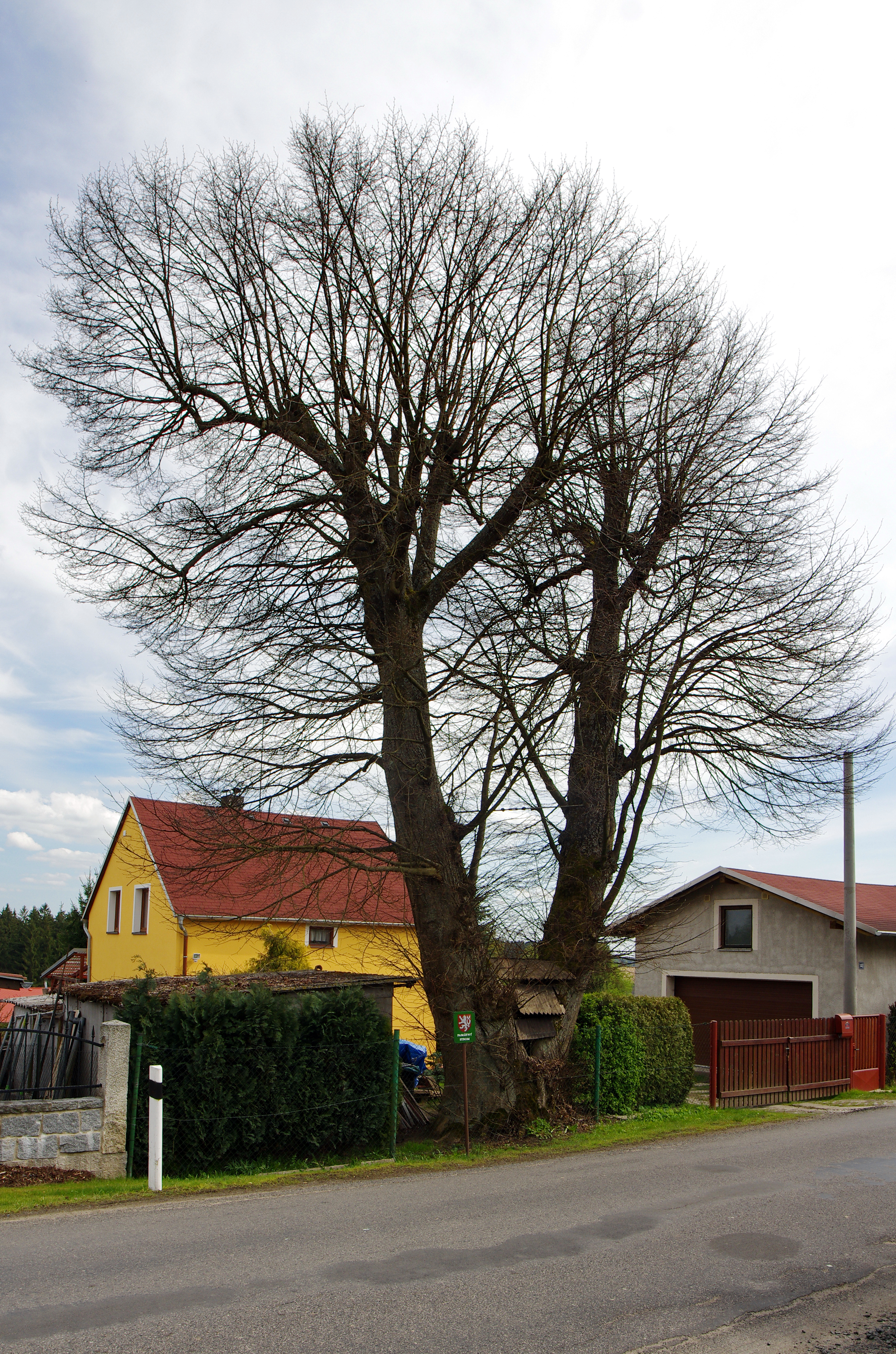 Památný strom Krásenská lípa, Krásné (část obce Tři Sekery), okres Cheb